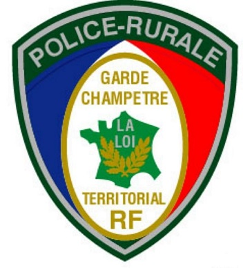 Insigne porté sur le bras gauche des gardes champêtres territoriaux